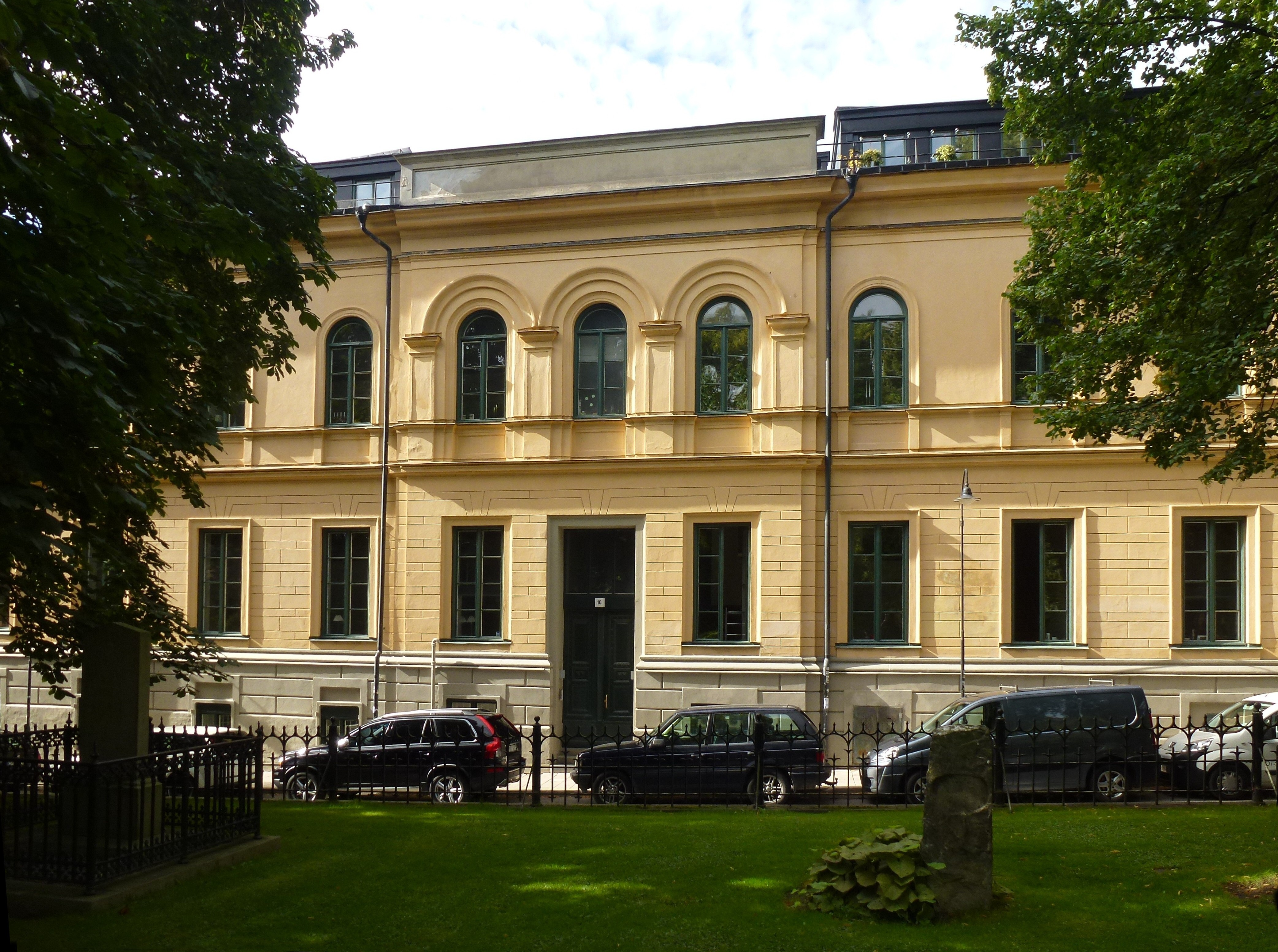 Katarina västra skola